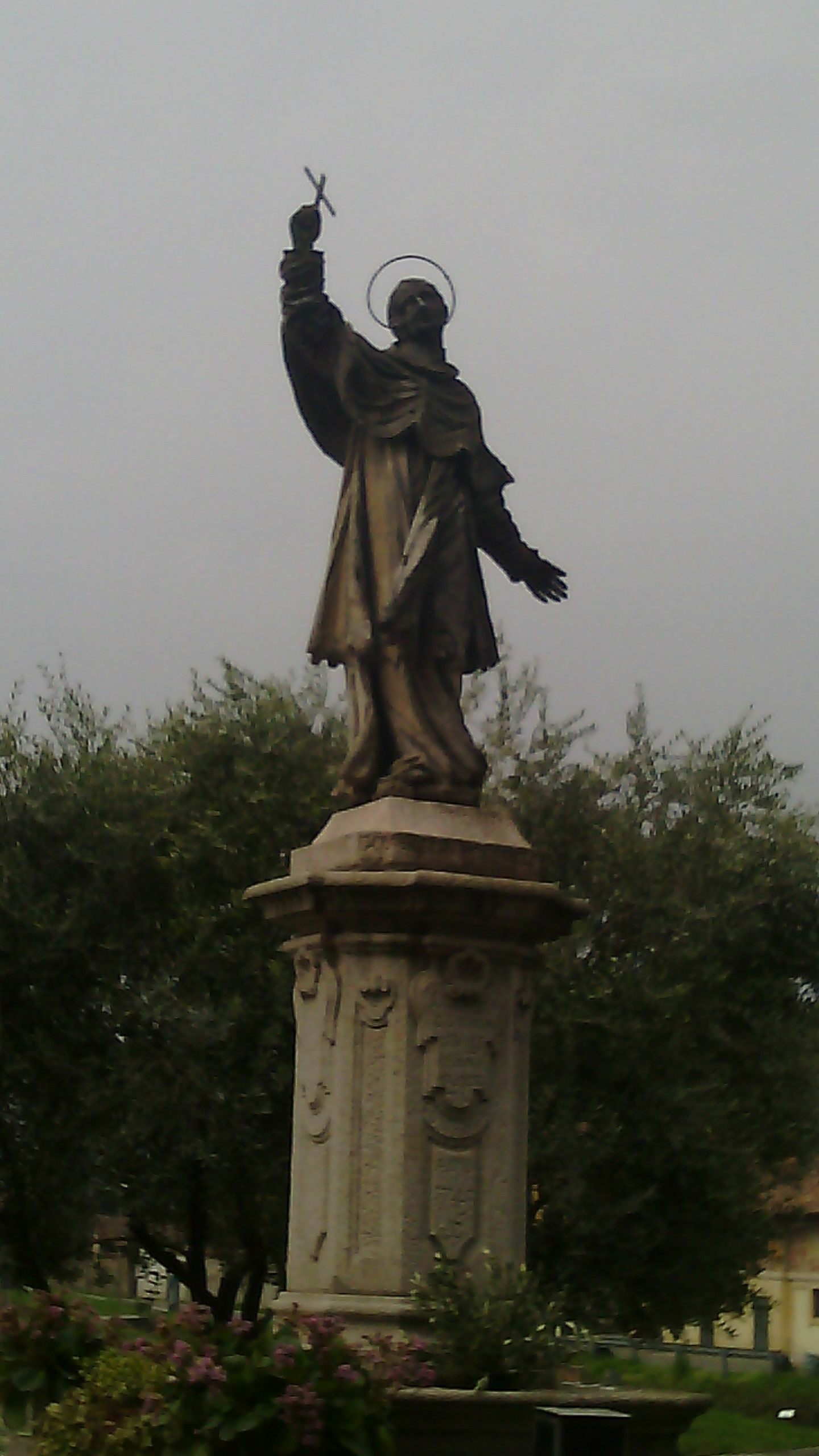 Statua di San Carlo Borromeo presso il Naviglio Grande a Cassinetta di Lugagnano (MI) - Italy